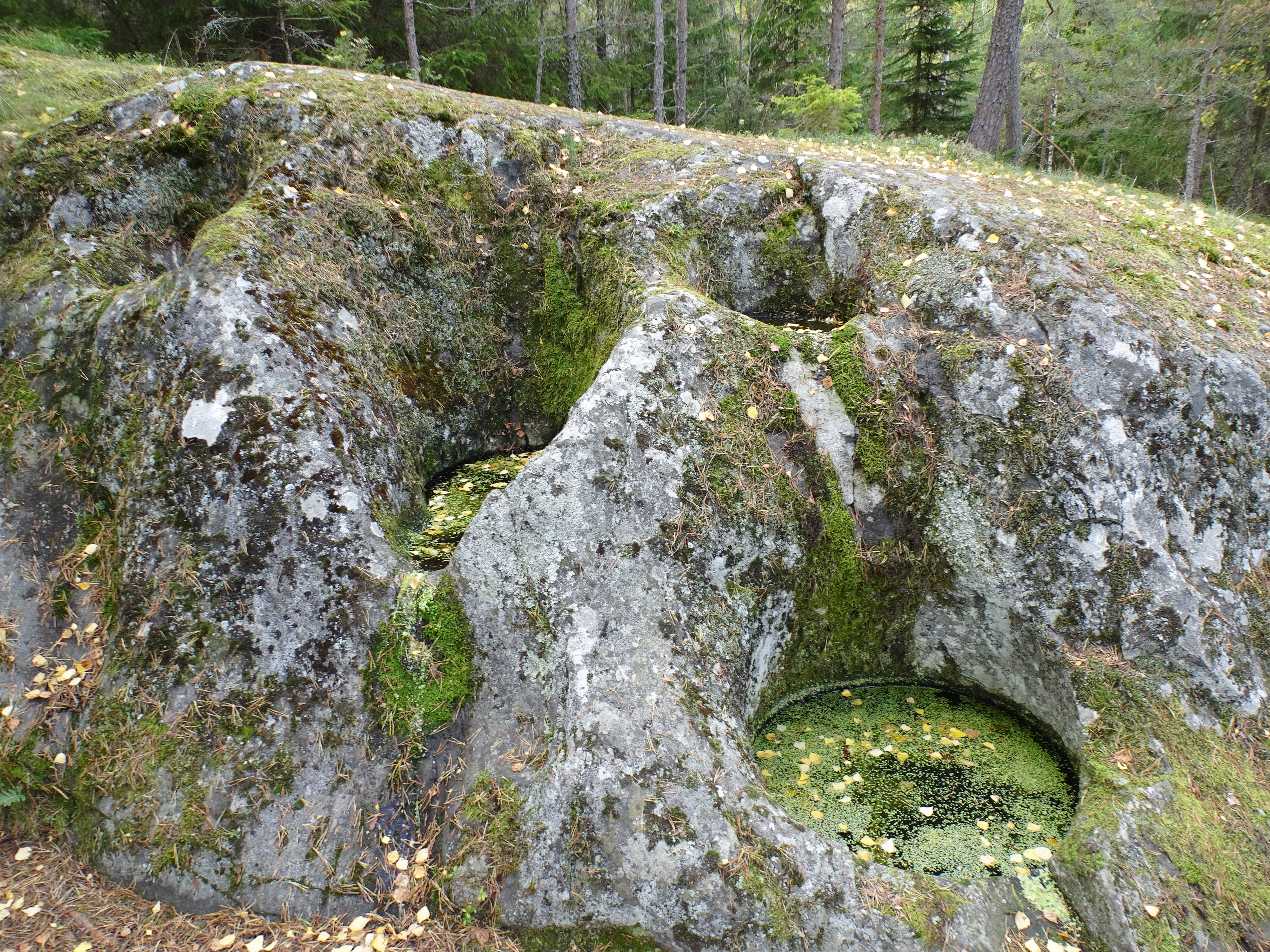 Gålö, jättegrytor nära Askviken (RAÄ-nummer Österhaninge 519:1)